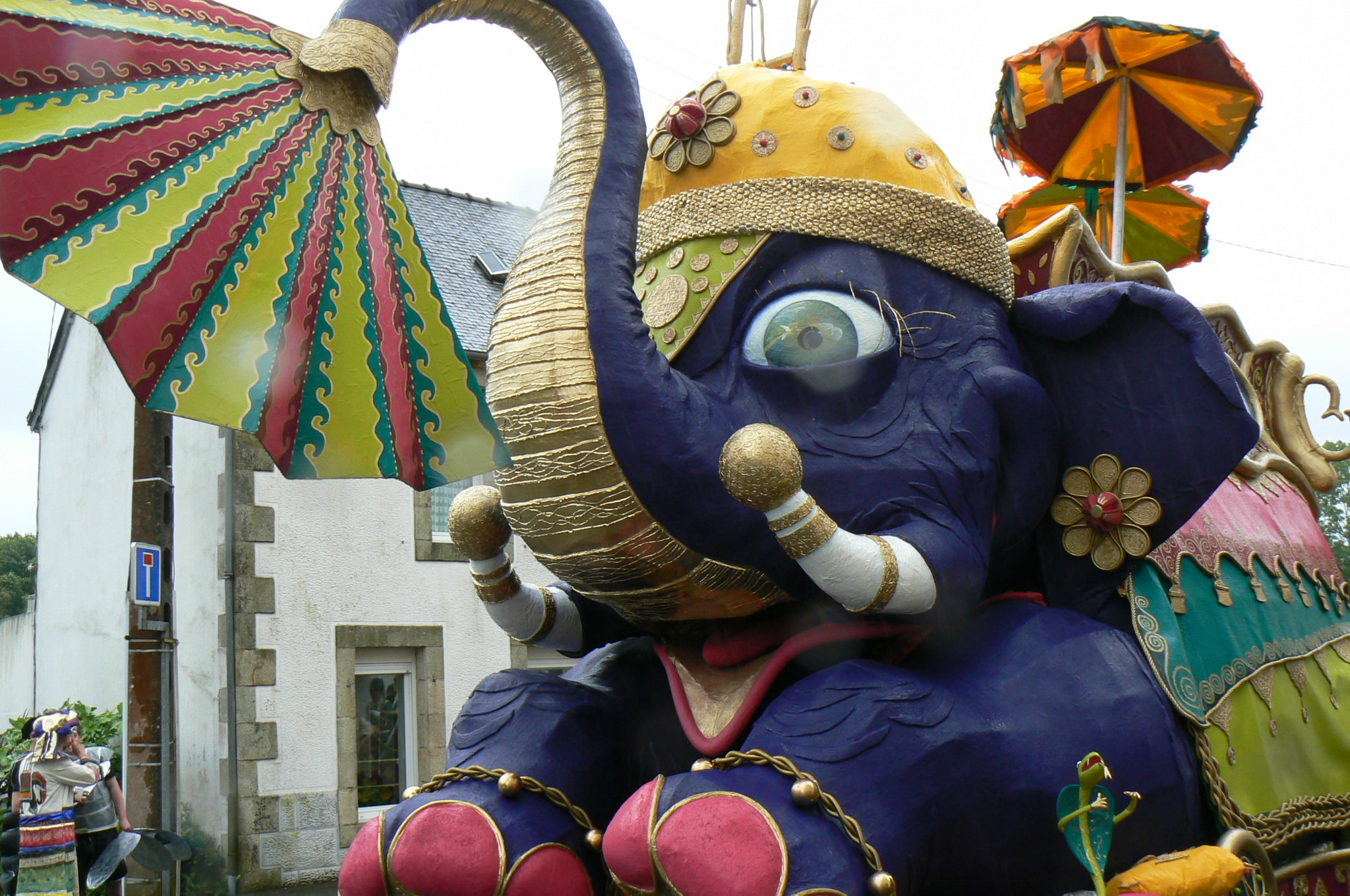 un char artistique de la cavalcade de scaër édition 2007 : "ganesh zo skuizh"